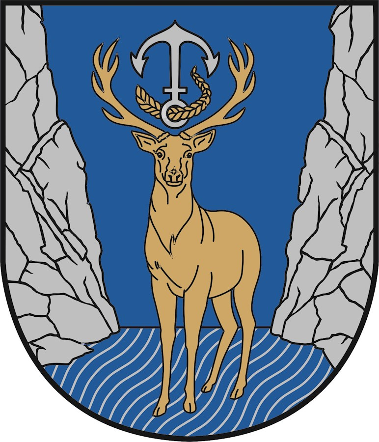 Geschichtliche Überlieferung der Symbole: Der Hirsch als Wappentier von Passail stolziert in der Raab. Die beiden Felsen stellen den Lindenberg und den Gaasberg dar. Die geschichtliche Überlieferung des Zopfes ist, dass Anges von Pernegg anlässlich des Kreuzzuges ihres Verlobten Ritter Wulfing von Stubenberg den wunderschönen, langen, blonden Haarzopf abschnitt und ihrem Geliebten als Erinnerung mitgab. Der Anker versinnbildlicht die Schifffahrt, also eben den Kreuzzug. Dies ist gängigste Geschichte des Wappens. Es gibt geschichtliche Ausarbeitungen in denen der Zopf ein geflochtenes Seil darstellt oder der Anker als Barte (Waffe) dargestellt wird.